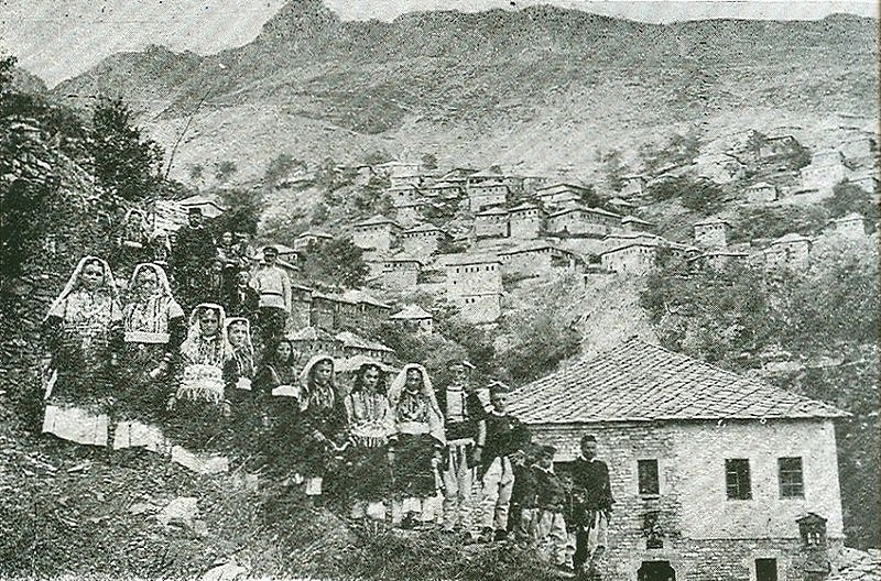 Галичник и Галичани во почетокот на XX век